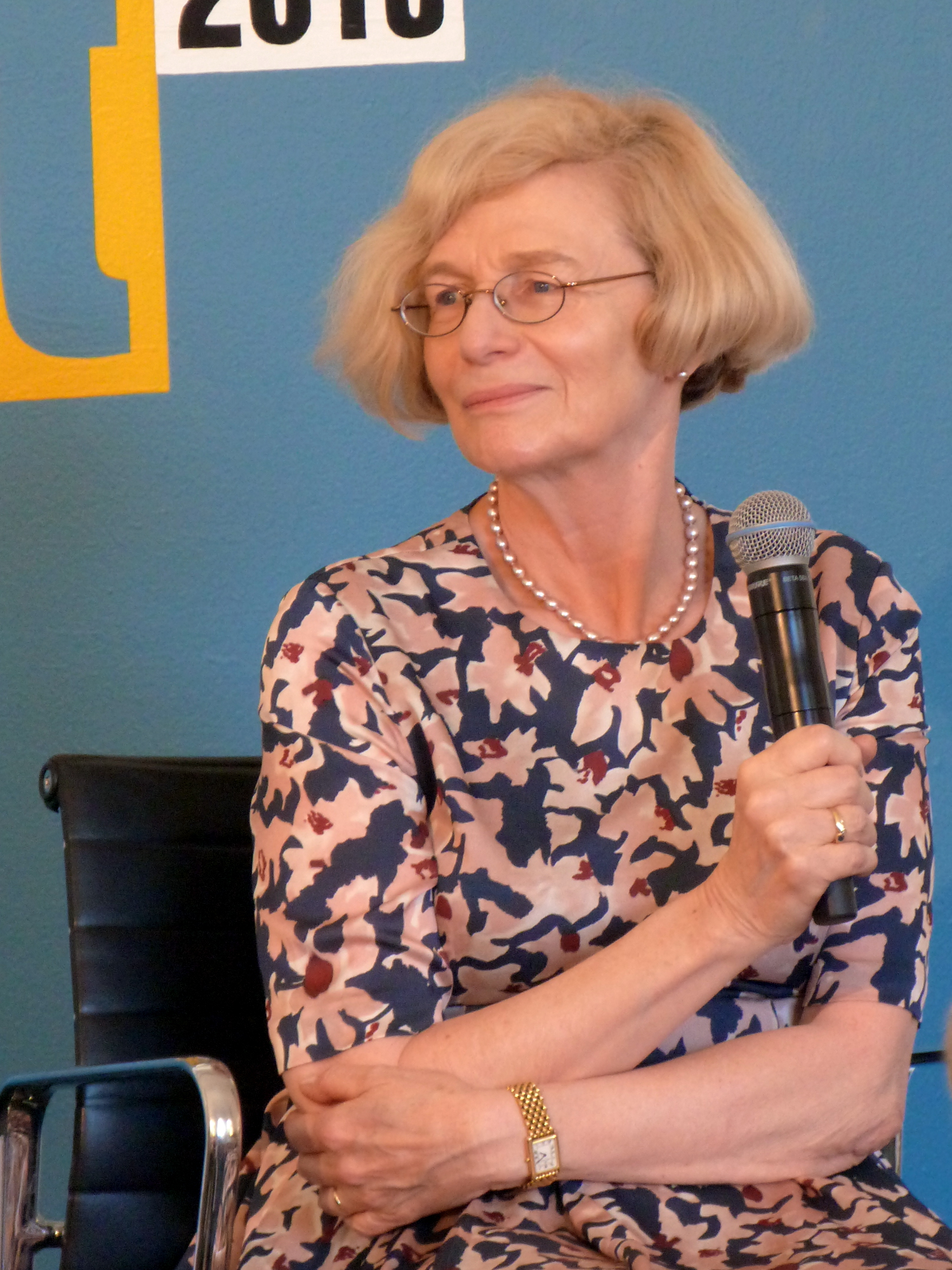 Die Autorin und Publizistin Deborah Vietor-Engländer vor einem Interview beim Erlanger Poetenfest 2016.